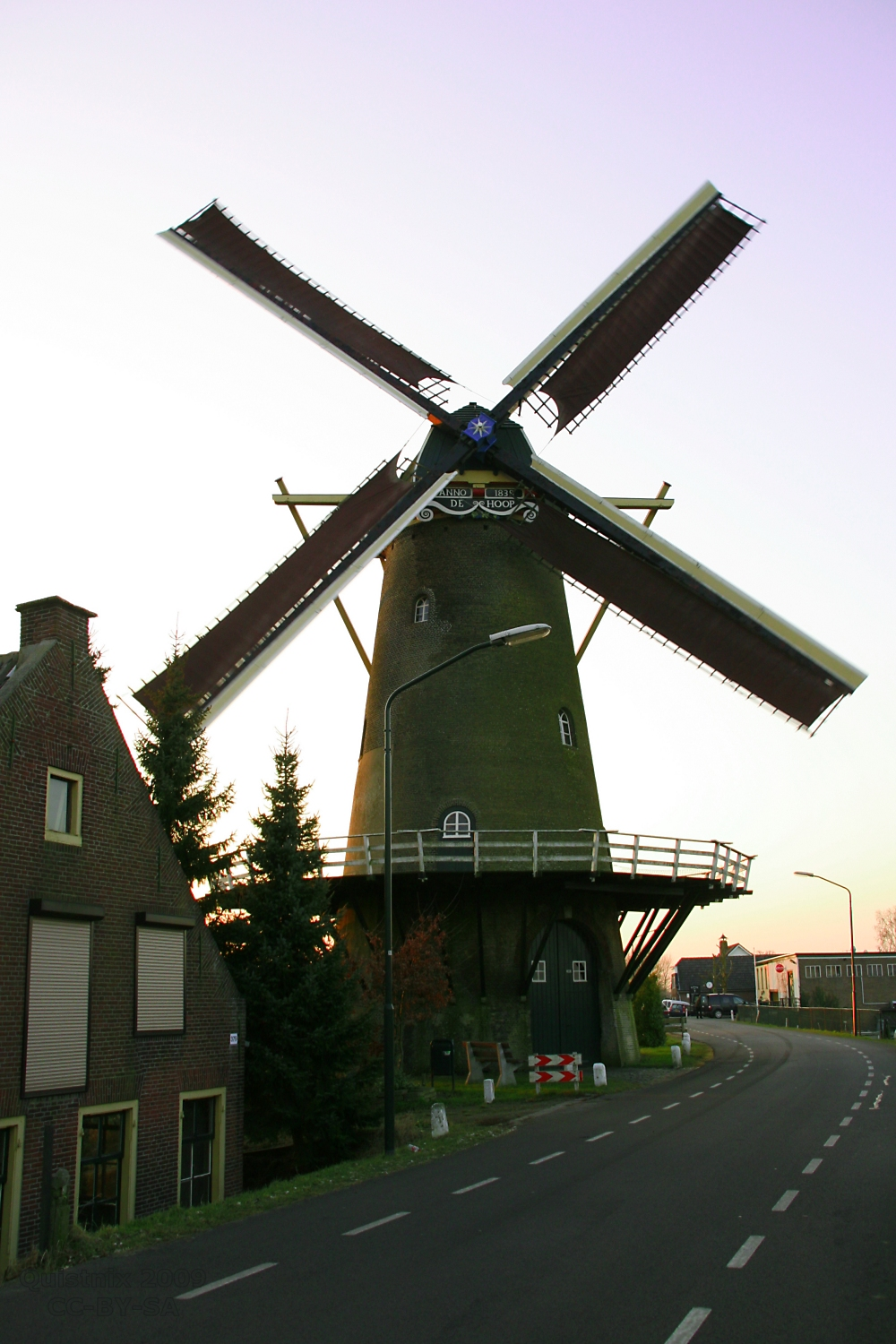 Veen (Aalburg): Molen De Hoop, draaiend met vier volle zeilen